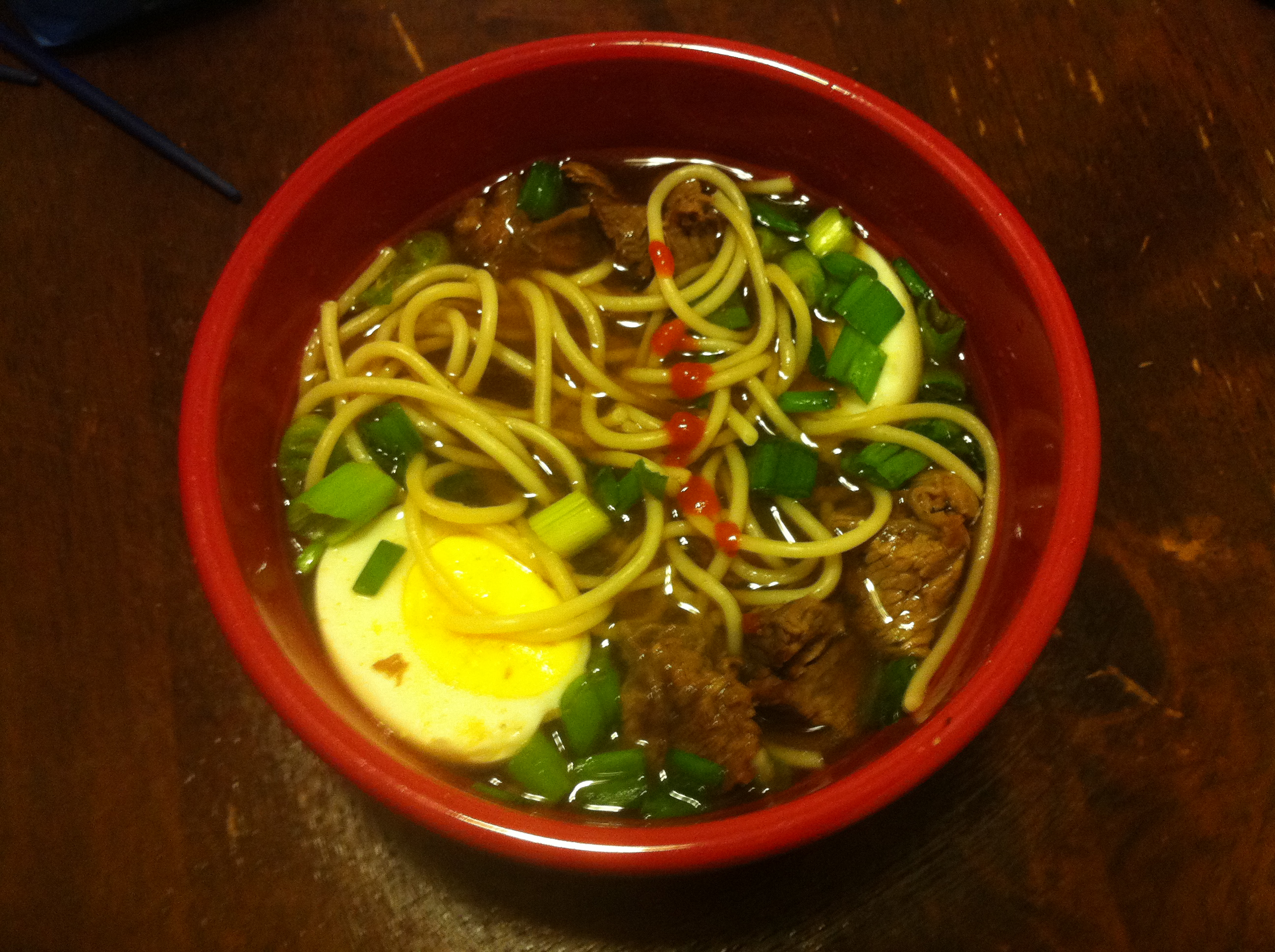 Bowl of Yaka mein.